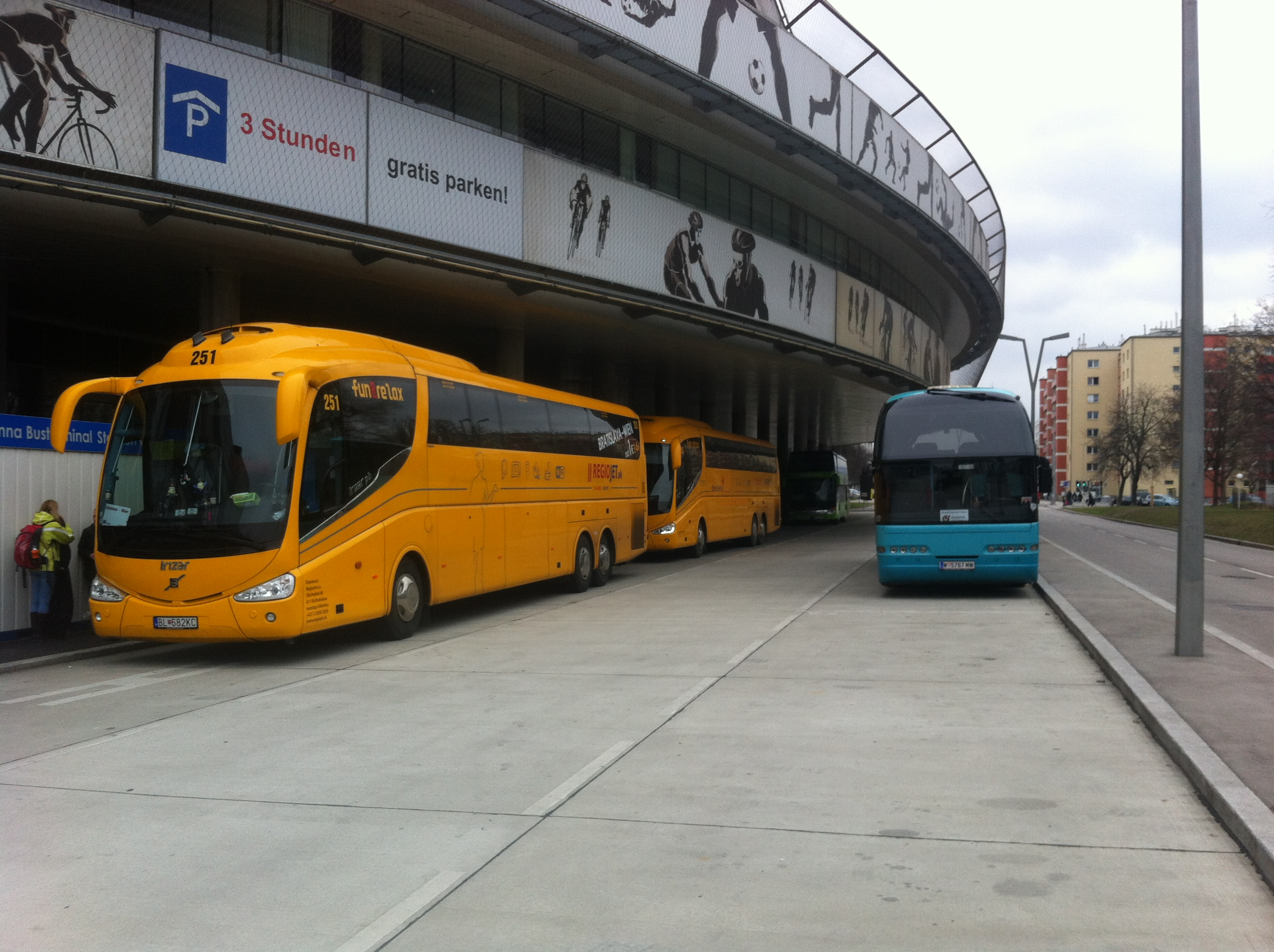 Busterminal Wien Station Center (ZOB)